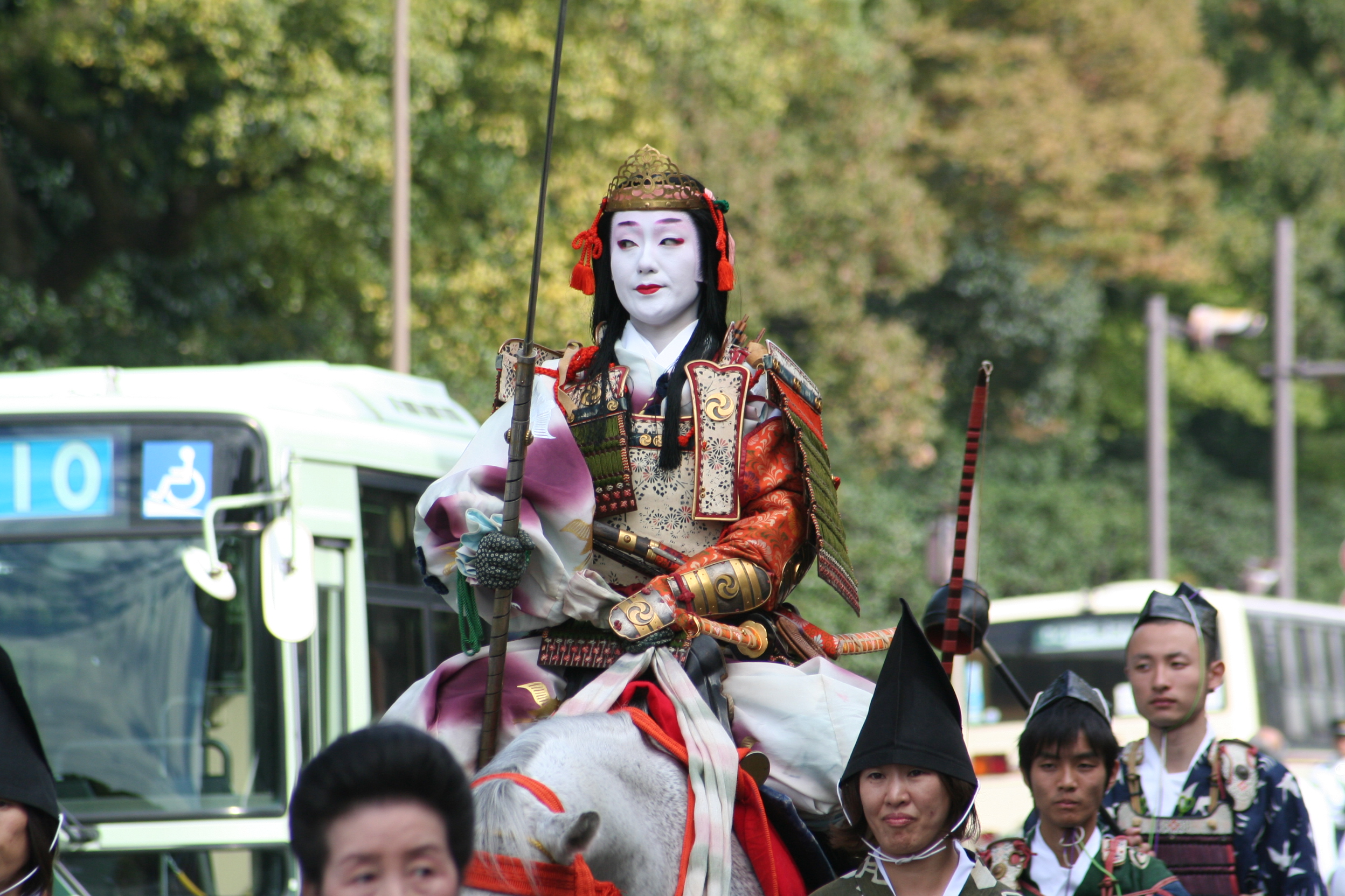 京都府京都市にて開催された時代祭。正午の御所から平安神宮までの行進の様子。2009年10月22日撮影。